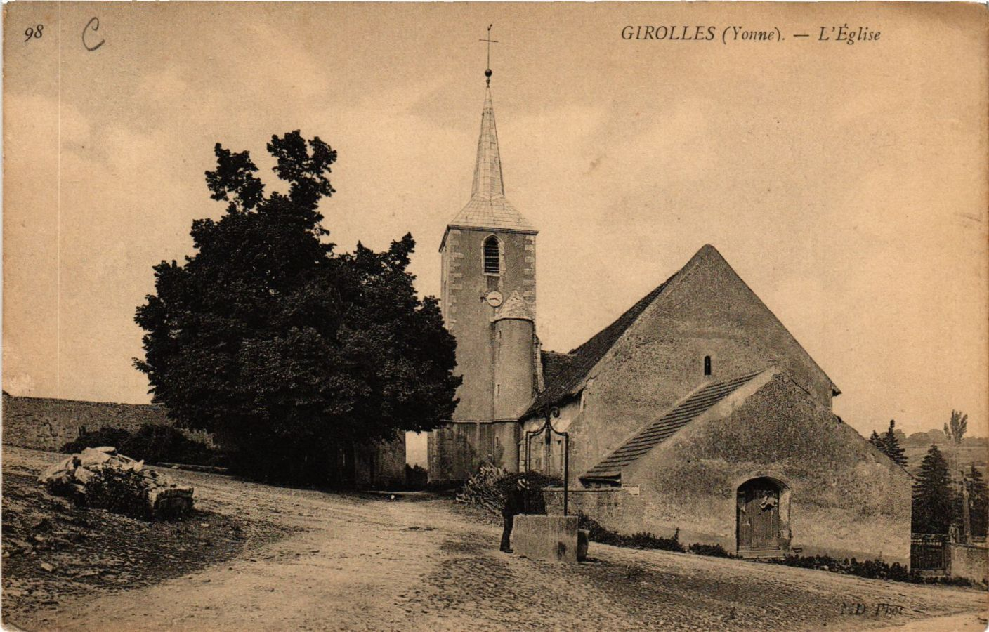 Église Saint-Didier de Girolles vers 1920.